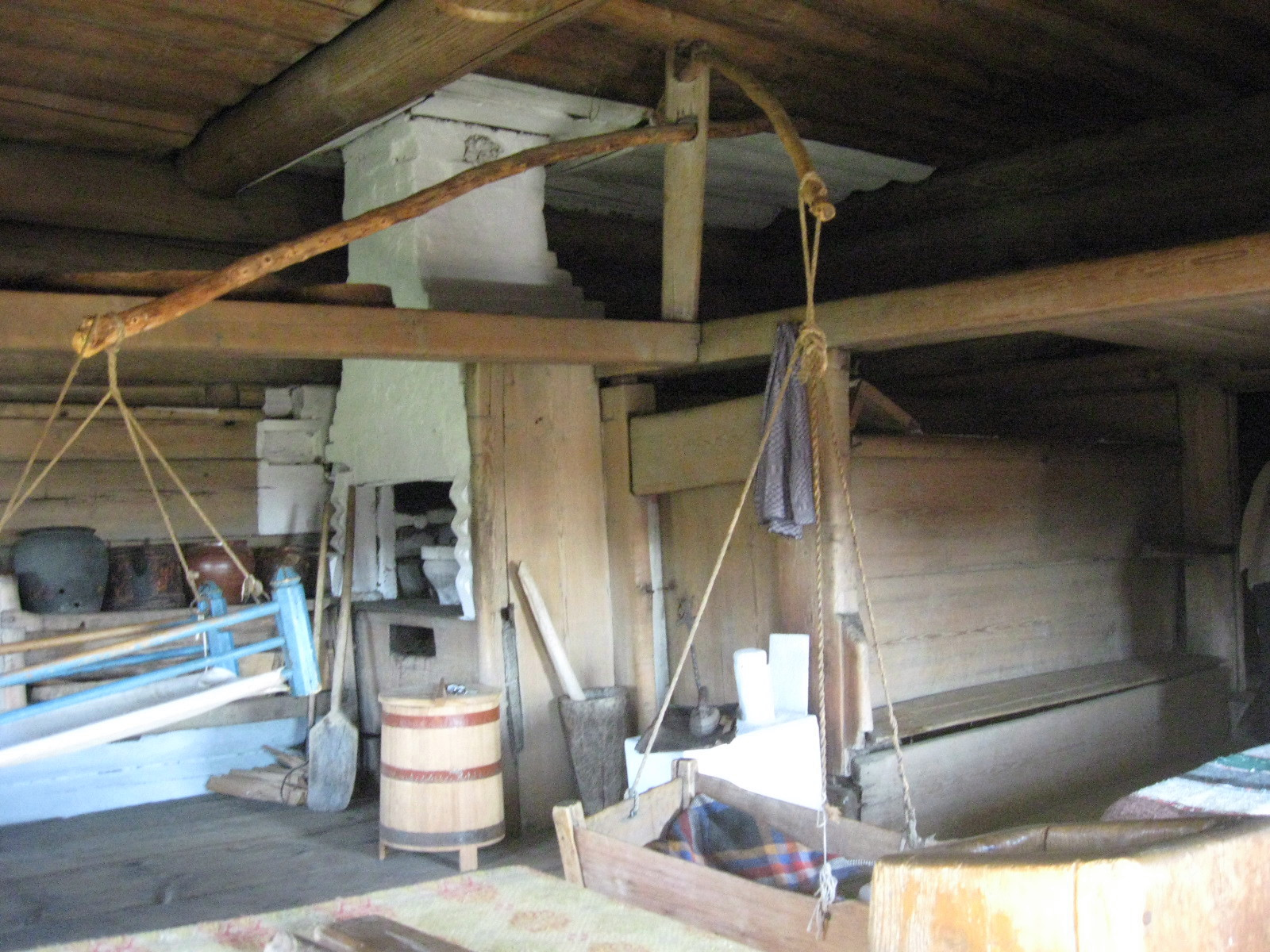 Изба клетская бабы Кати (Свердловская область, Алапаевск, переулок Пушкина, 1)